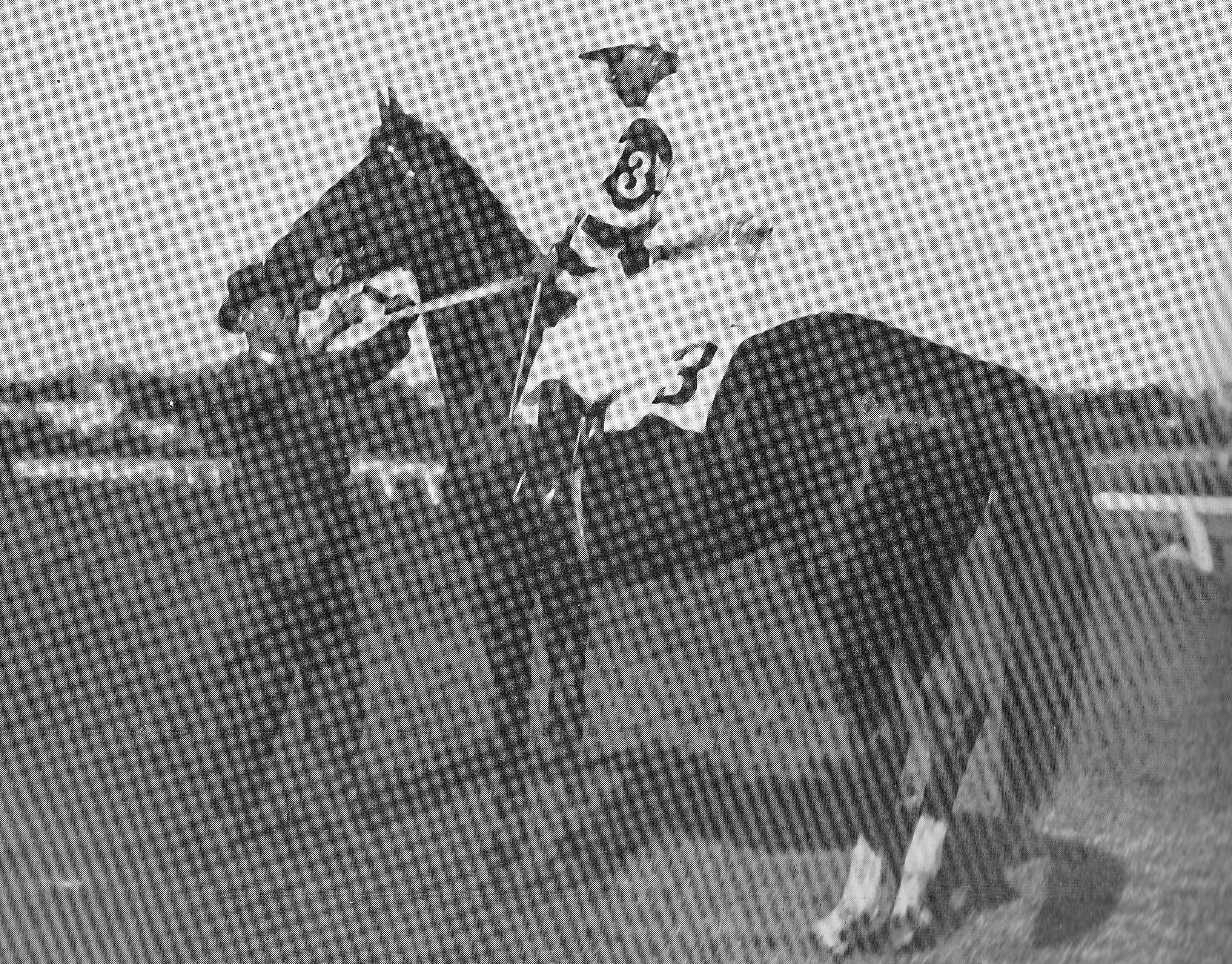 御賞典拝受のトクマサ